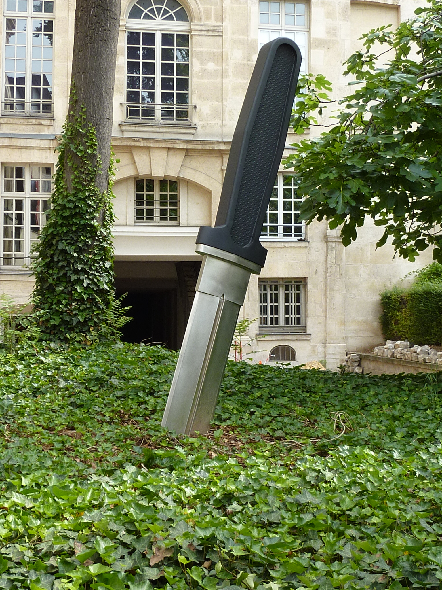 Maison européenne de la photographie